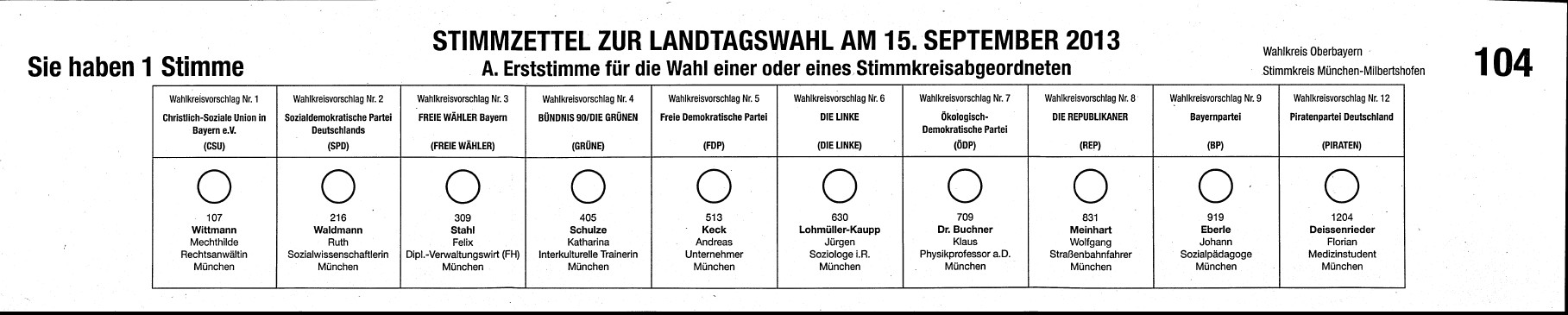 Stimmzettel für die Erststimme im Stimmkreis 104 (München-Milbertshofen) bei der Wahl des Bayerischen Landtags am 15. September 2013.